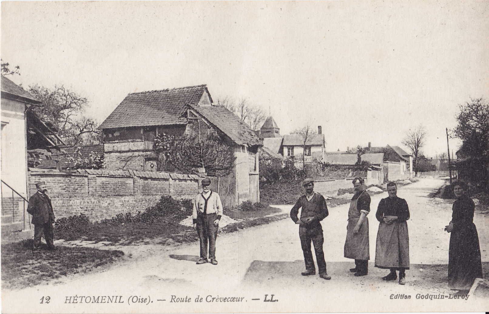 Carte postale ancienne éditée par Godquin-Leroy LL n°12 : HETOMESNIL - Route de Crèvecoeur